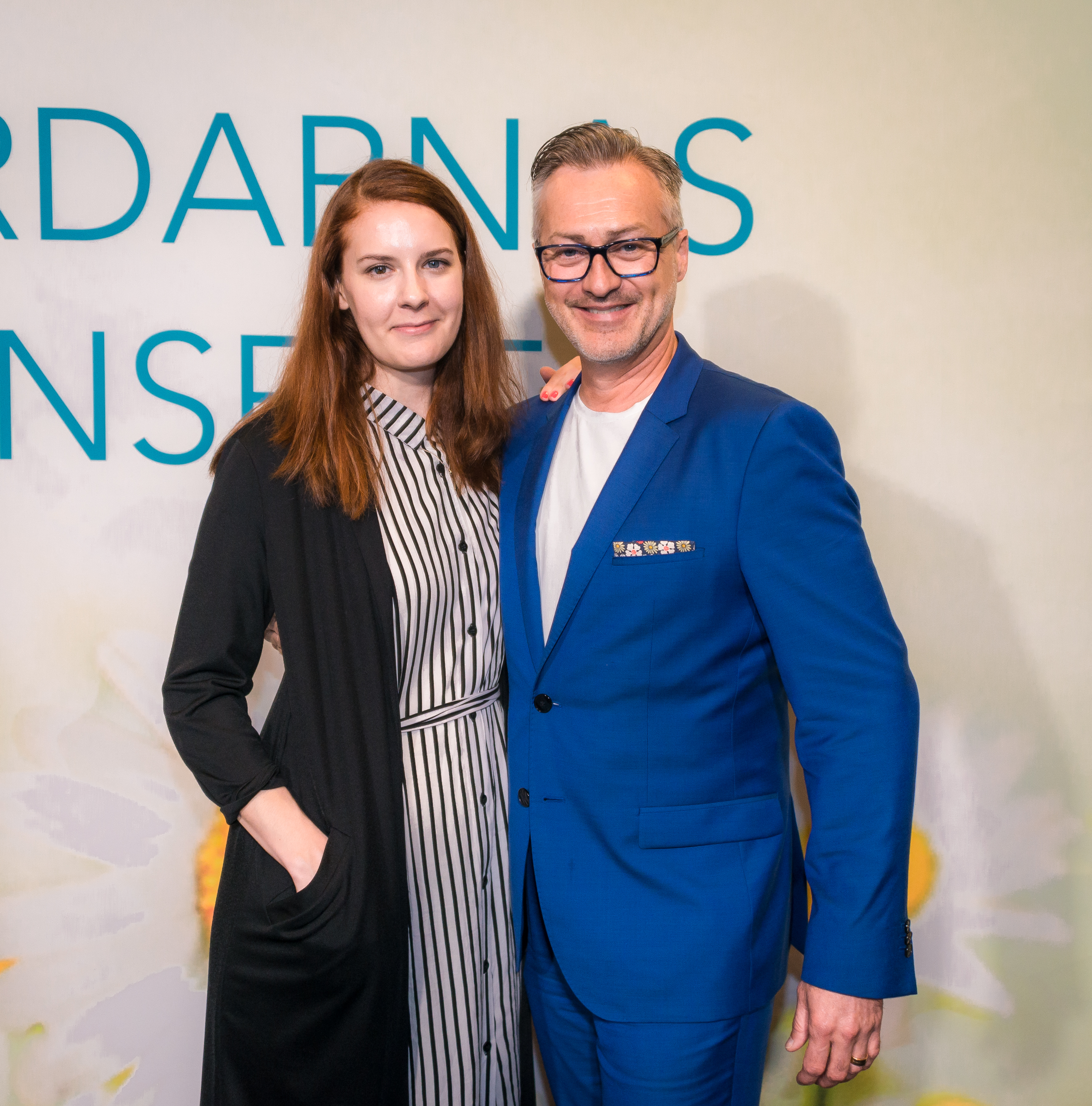 Tony Irving, Sommarvärd i P1, tillsammans med sin sommar-producent Clara Åström på röda mattan på väg in i Berwaldhallen i Stockholm den 13 juni 2019.